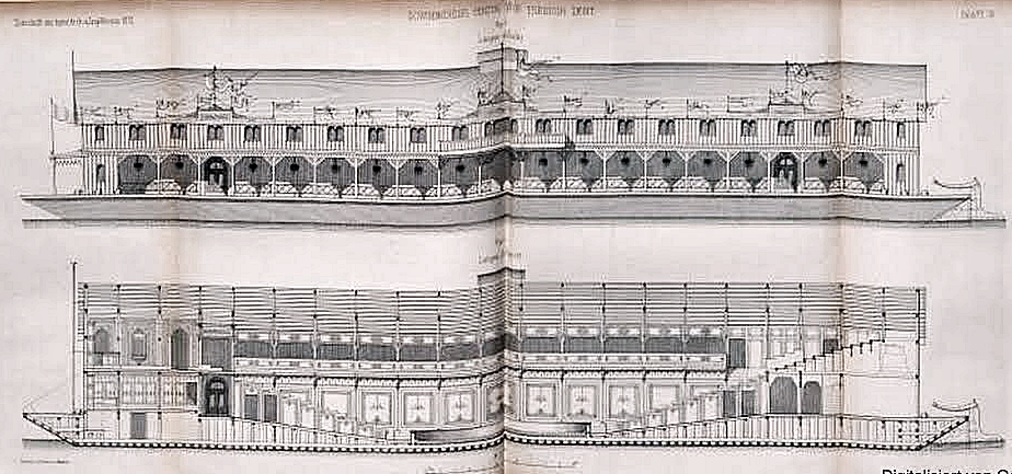 Das Zirkusschiff des schwimmenden Rheinzirkus Lent